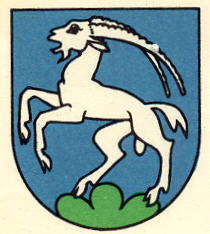 Wappen von Grone Kanton Wallis Schweiz